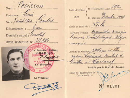 Lucien Pélissou